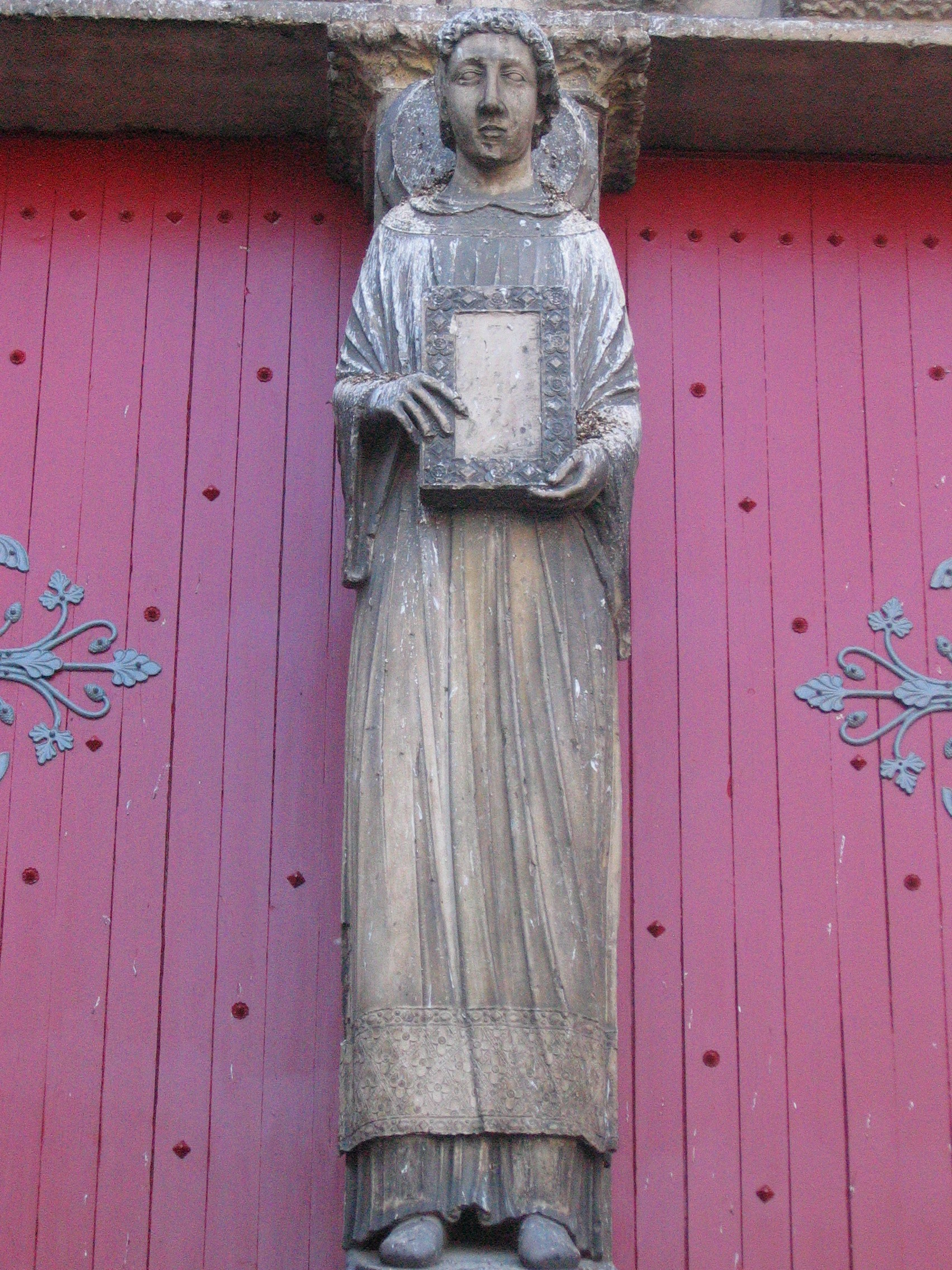 Cathédrale de Sens, Yonne, France : statue du trumeau du portail central, représentant saint Etienne, fin XIIe siècle